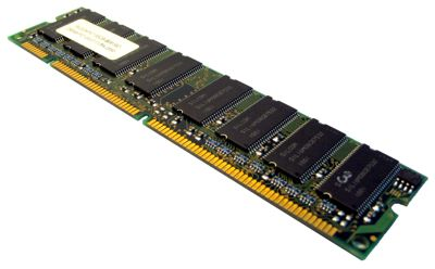 pamięć RAM: SDRAM, 256MB, 133MHz, obudowa SIL3246